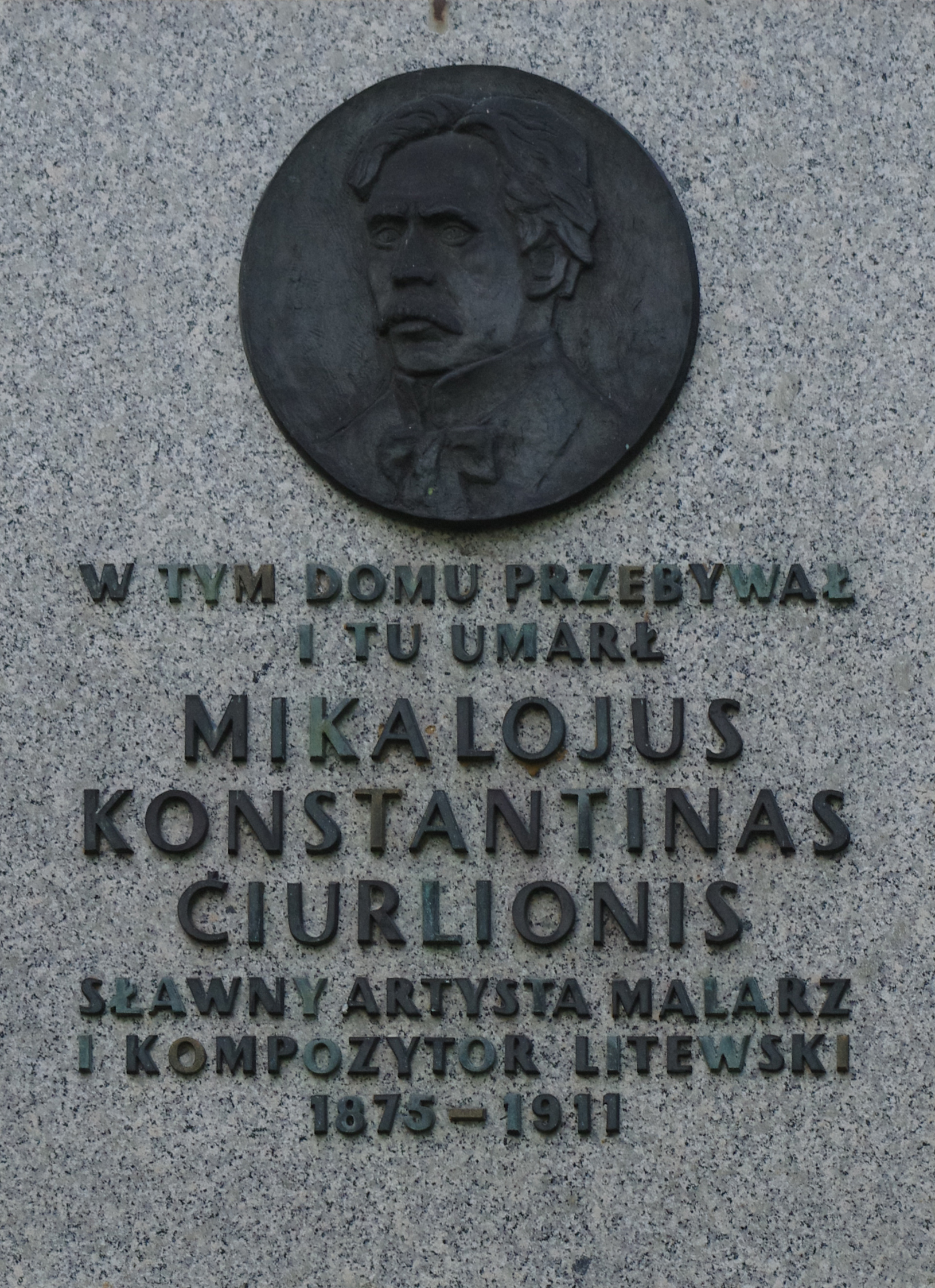 Tablica upamiętniająca litewskiego kompozytora i malarza Mikalojusa Konstantinasa Čiurlionisa na Czerwonym Dworze w Pustelniku w Markach, gdzie przez pewien czas mieszkał.